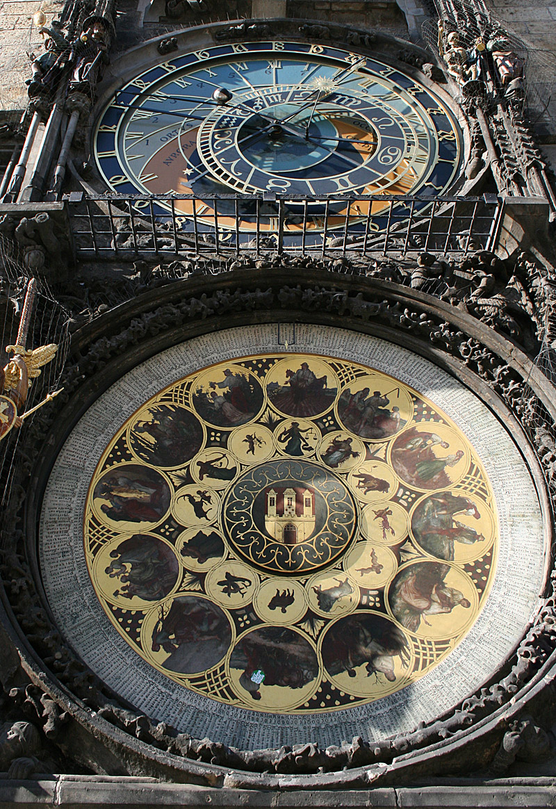 Prague Astronomical Clock